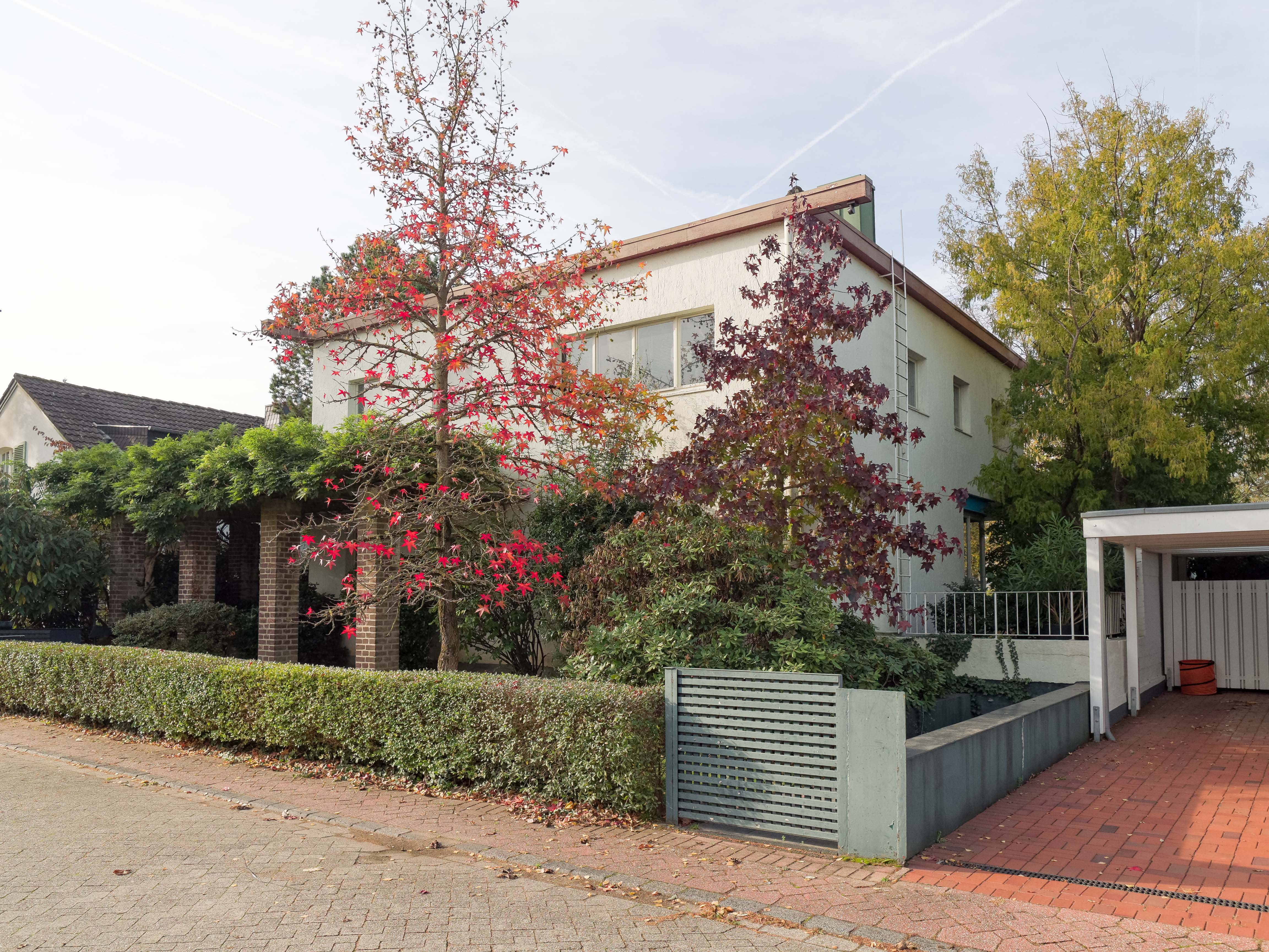 Baudenkmäler Wittlaer 1205: Am Mühlenkamp 9